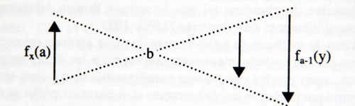 Formule canonique du mythe selon Pierre Maranda et Ellie Köngas-Maranda.